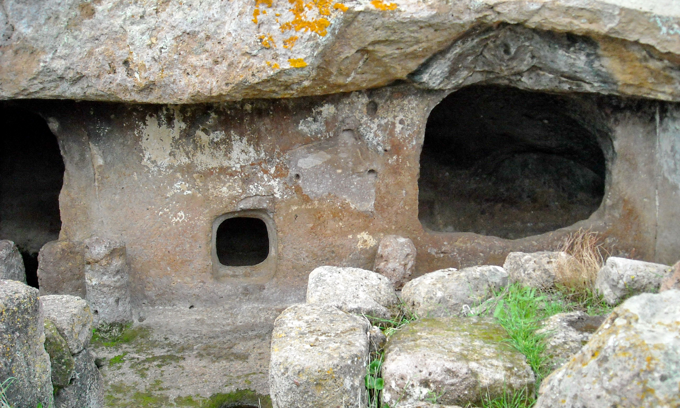 Necropoli di Montessu - MIBAC This is a photo of a monument which is part of cultural heritage of Italy.